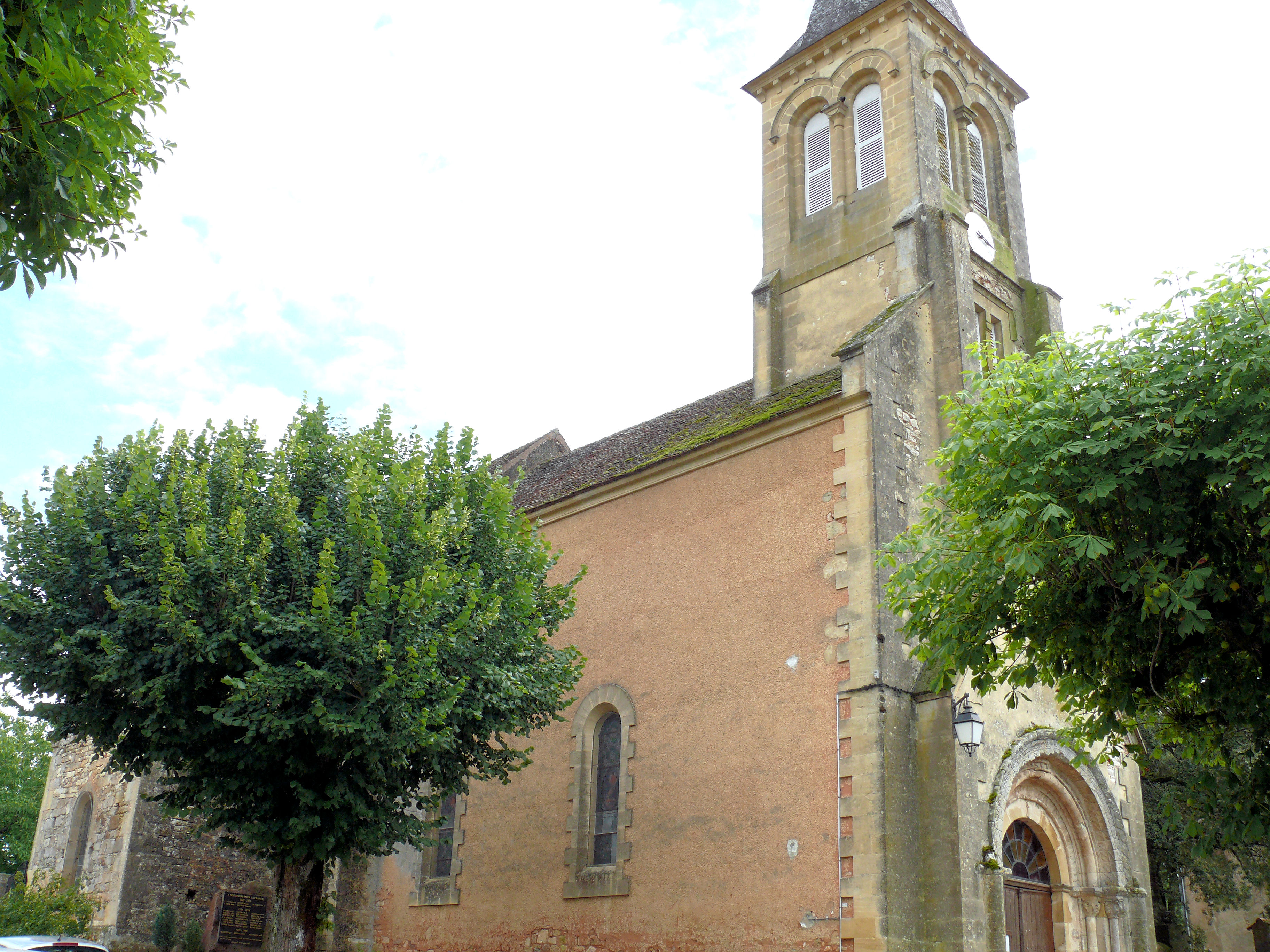 Saint-Laurent-la-Vallée - Eglise Saint-Laurent